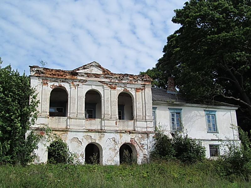 Відзы Лаўчынскія. Сядзіба